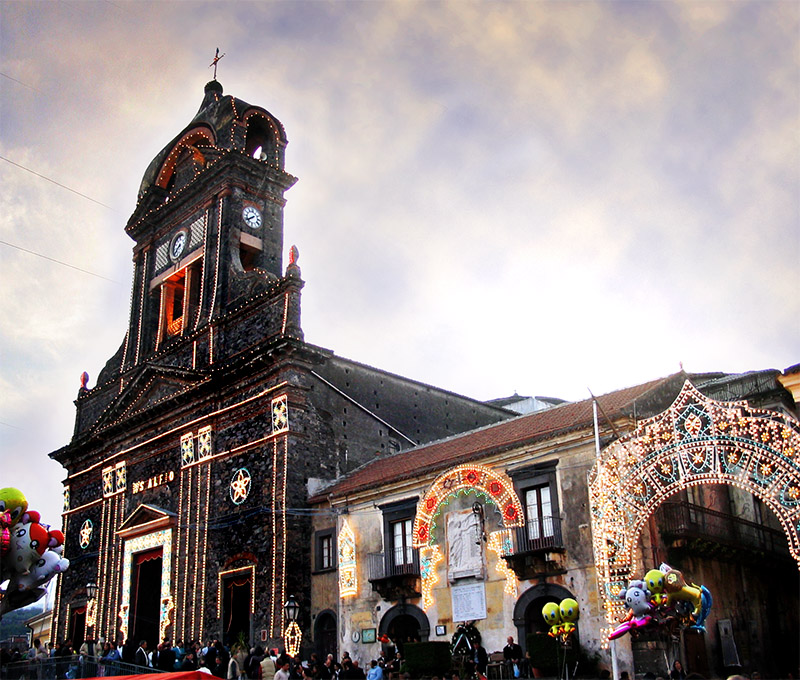 sant'Alfio: la festa paesana con lo sfondo della Chiesa dei Santi Alfio, Cirino e Filadelfo.